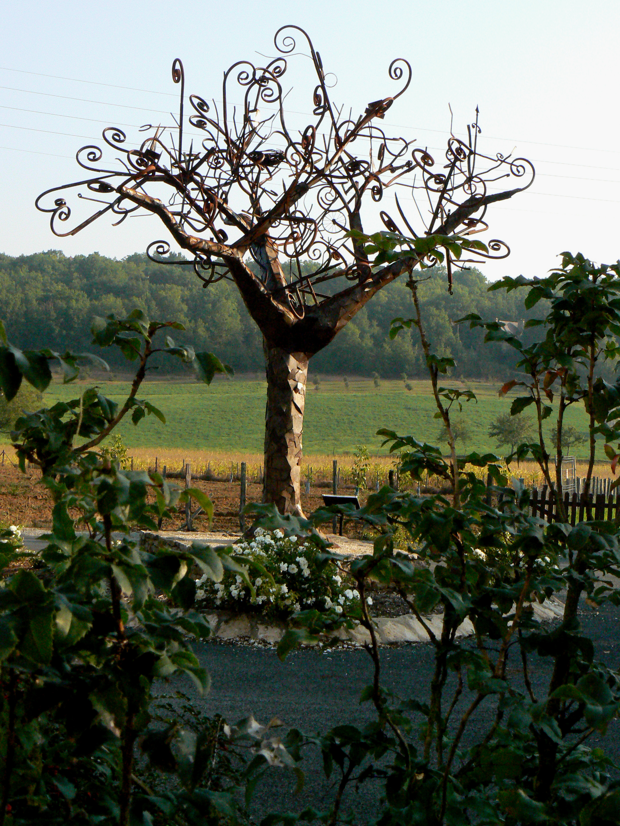 Sculpture de l'artiste plasticien Gignacois Fernando Costa